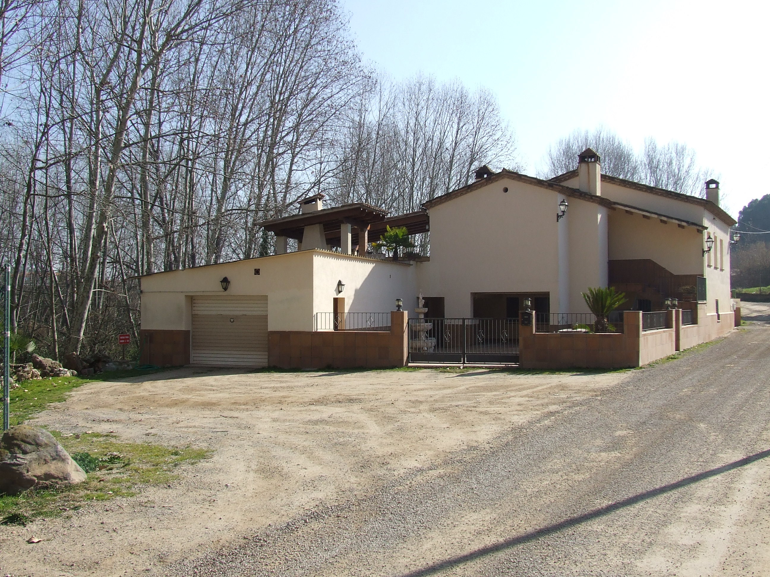 Can Segimon (Bigues, Bigues i Riells, Vallès Oriental)